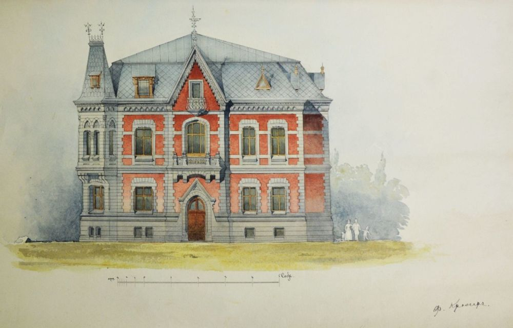 Крюгер Эдуард Фёдорович - Проект особняка в Санкт-Петербурге (1865)